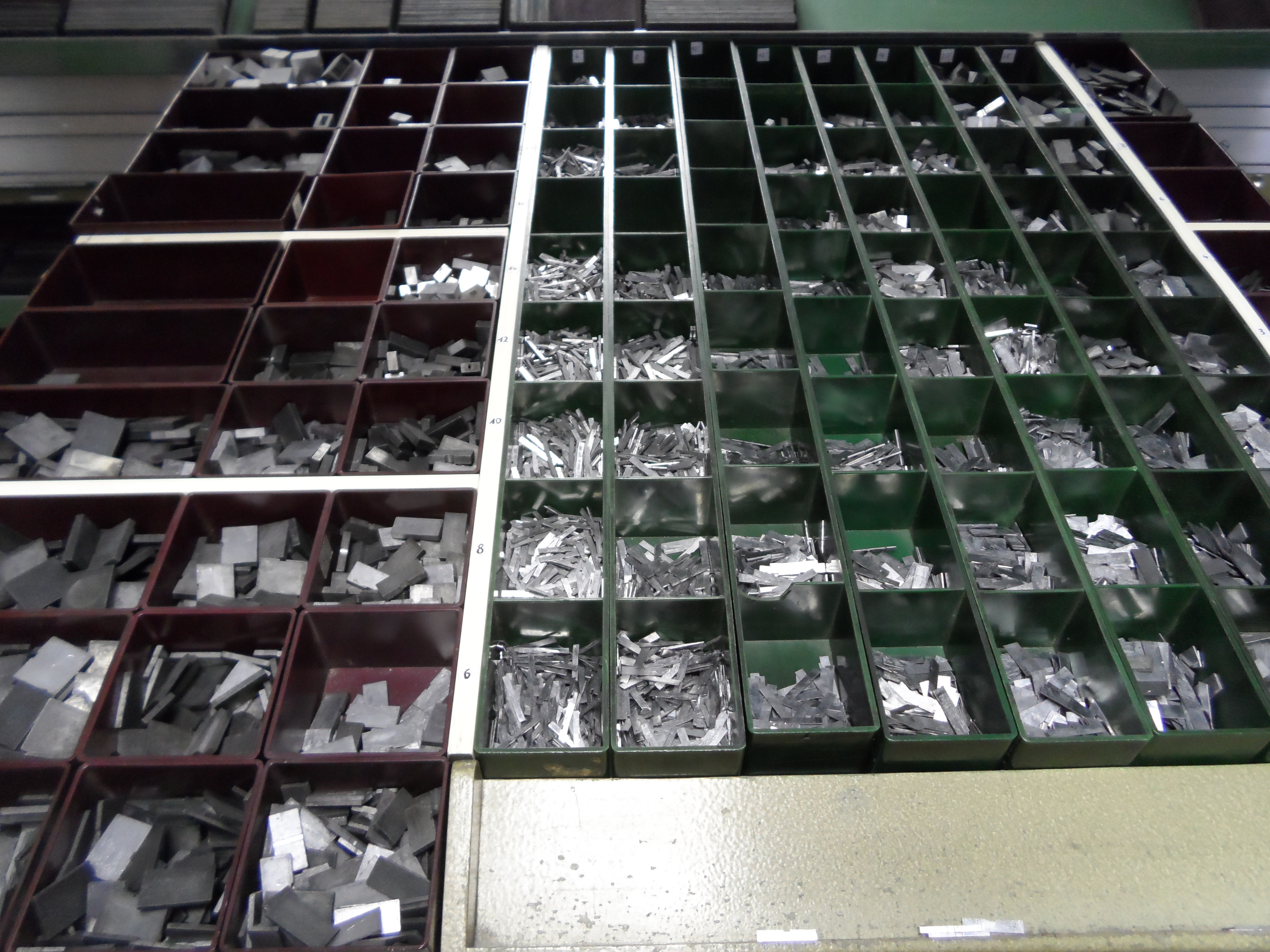 Blindsatzmaterial im Bleisatz – Beispiel Quadrate. Aufgenommen in der Offizin Haag Drugulin, Dresden, anlässlich des Schriftenfestes 10./11. August 2013.